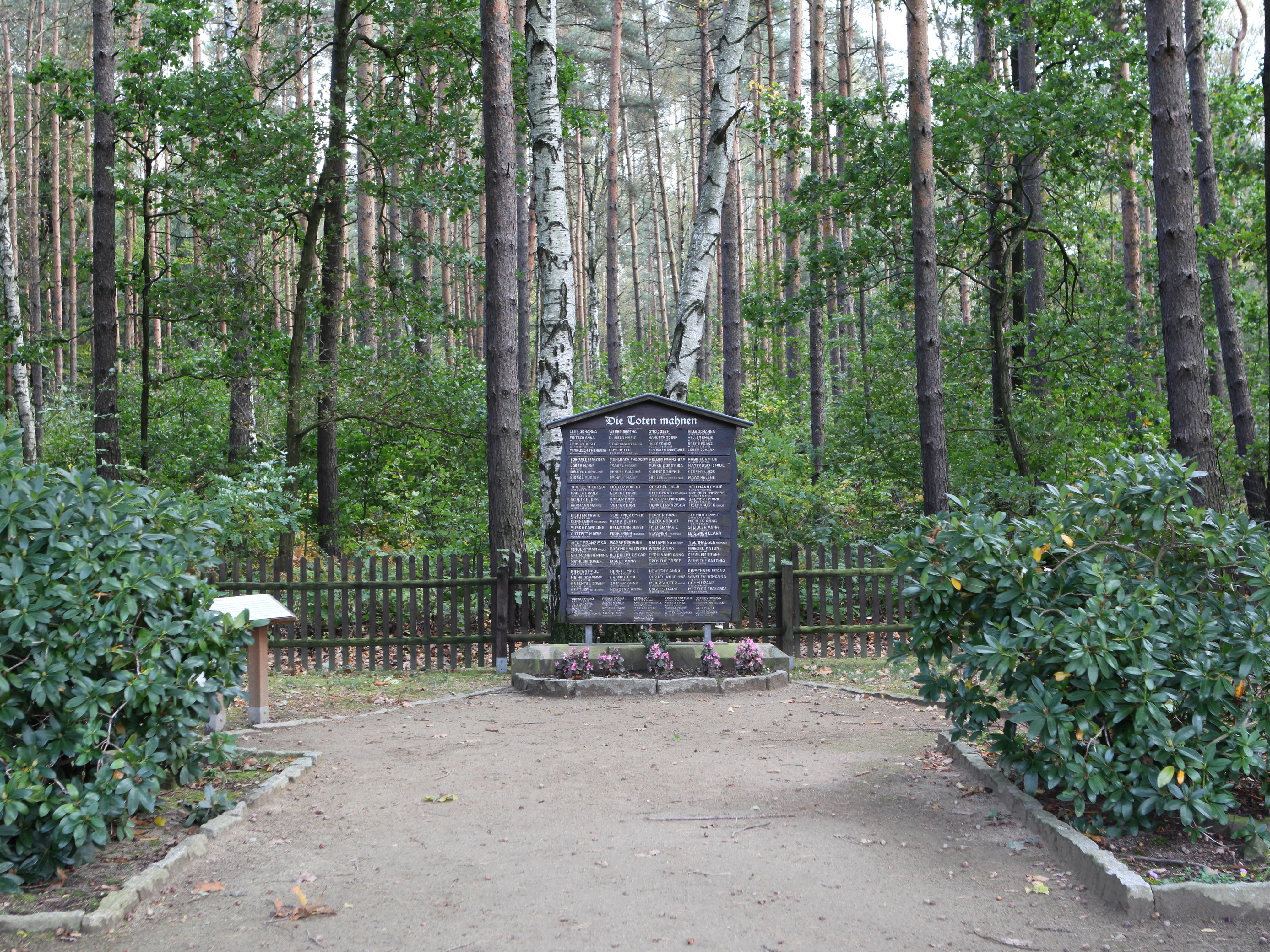 Waldfriedhof am Sellnitzgrund, Porschdorf, im Landkreis Sächsische Schweiz-Osterzgebirge